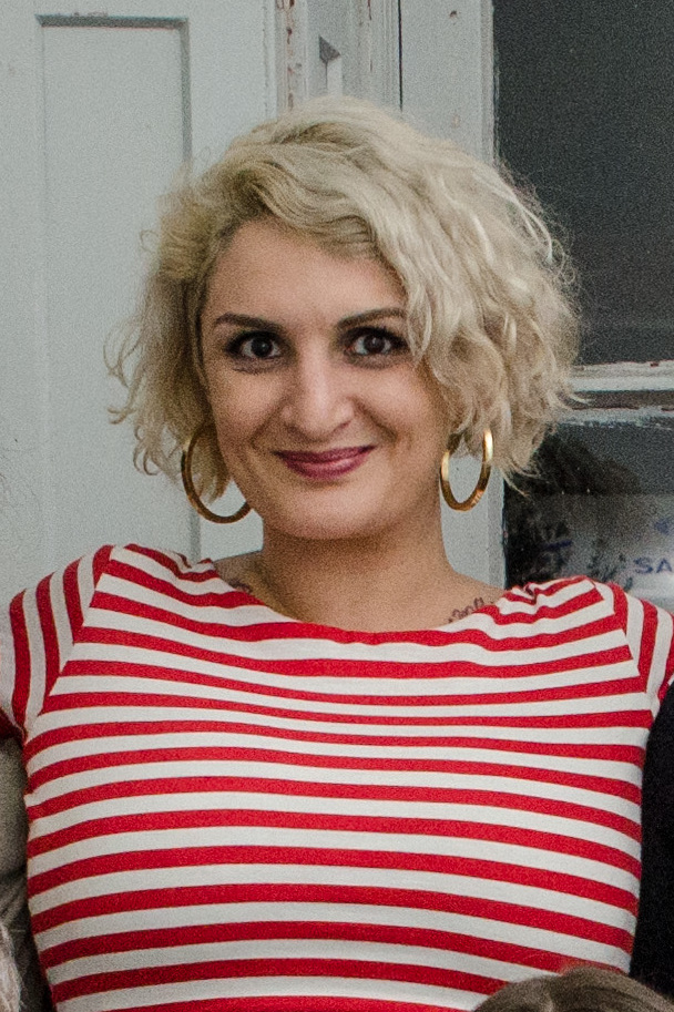 Conexões Globais 2016. Vila Flores. Porto Alegre. Abril de 2016. Oficina Escrita Criativa para Mulheres com Clara Averbuck